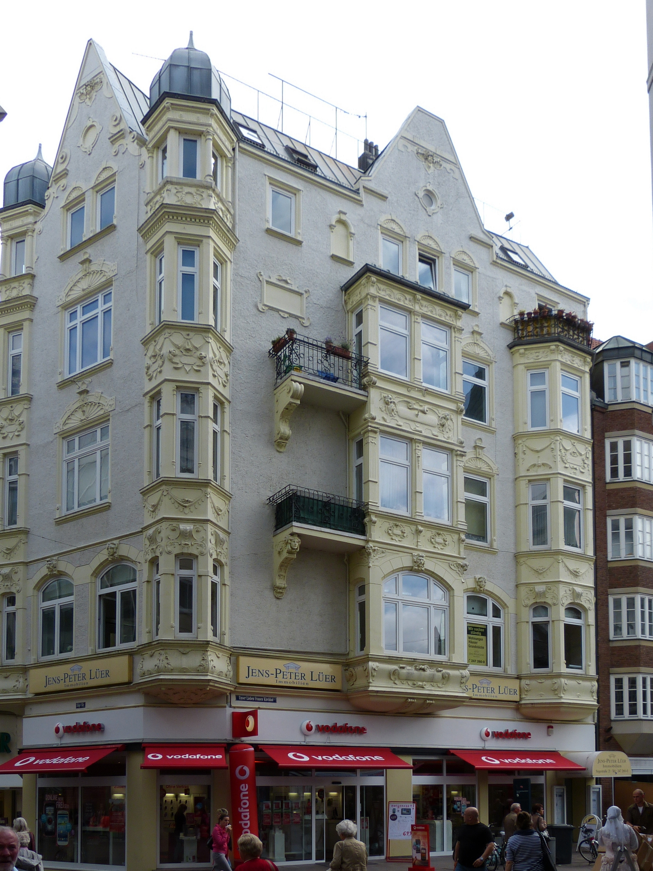 Geschäftshaus in Bremen, Unser Lieben Frauen Kirchhof 15Das abgebildete Objekt ist ein geschütztes Kulturdenkmal in der Freien Hansestadt Bremen, mit der Nr. 1462 beim Landesamt für Denkmalpflege registriert.